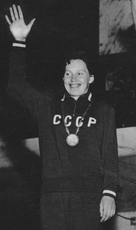 Valentina Rastvorova, 1960 Olympics